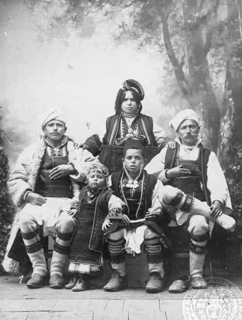 Селяни от Оризари, Битолско.